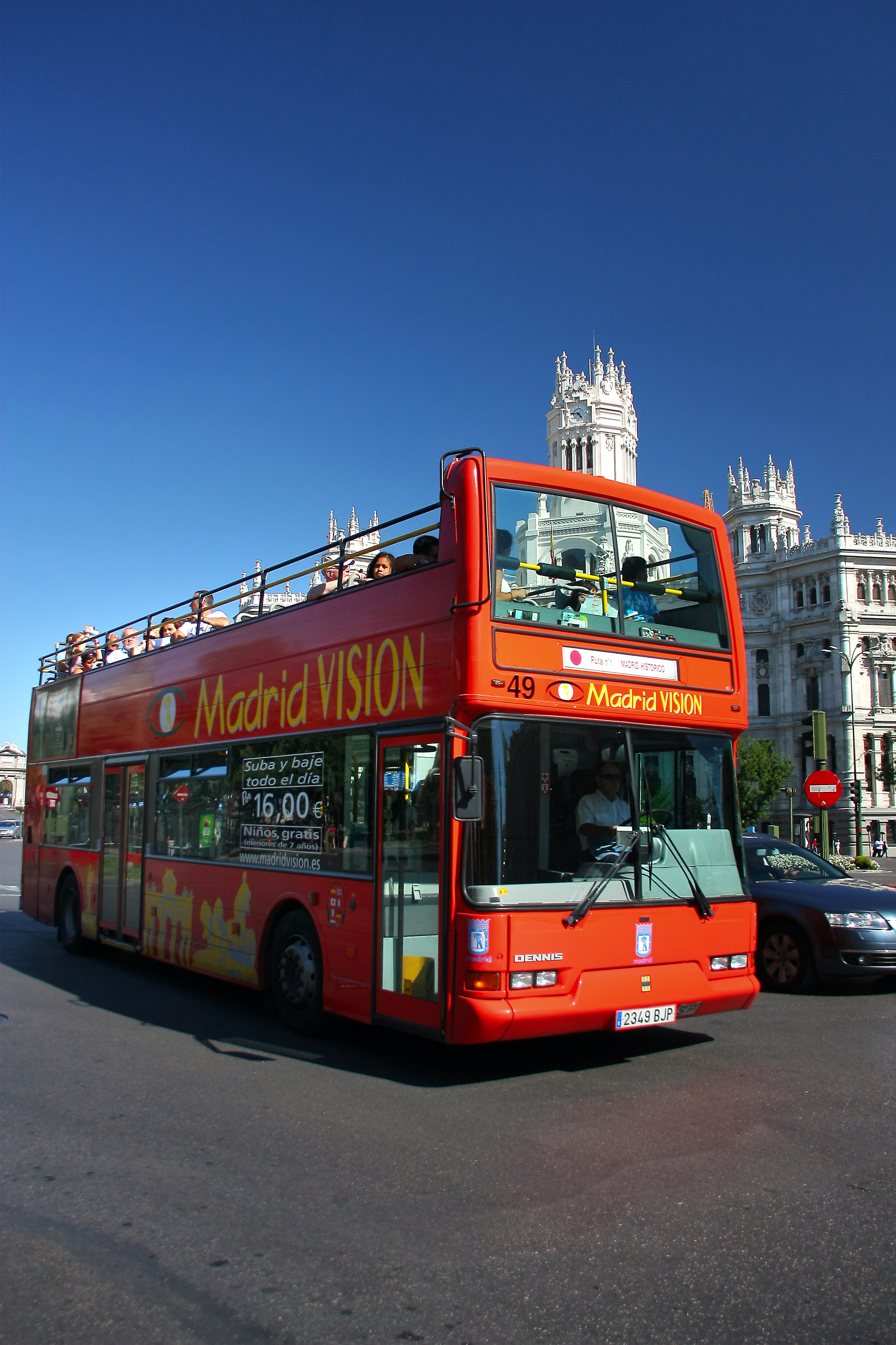 Bus de tourisme à Madrid, Espagne.